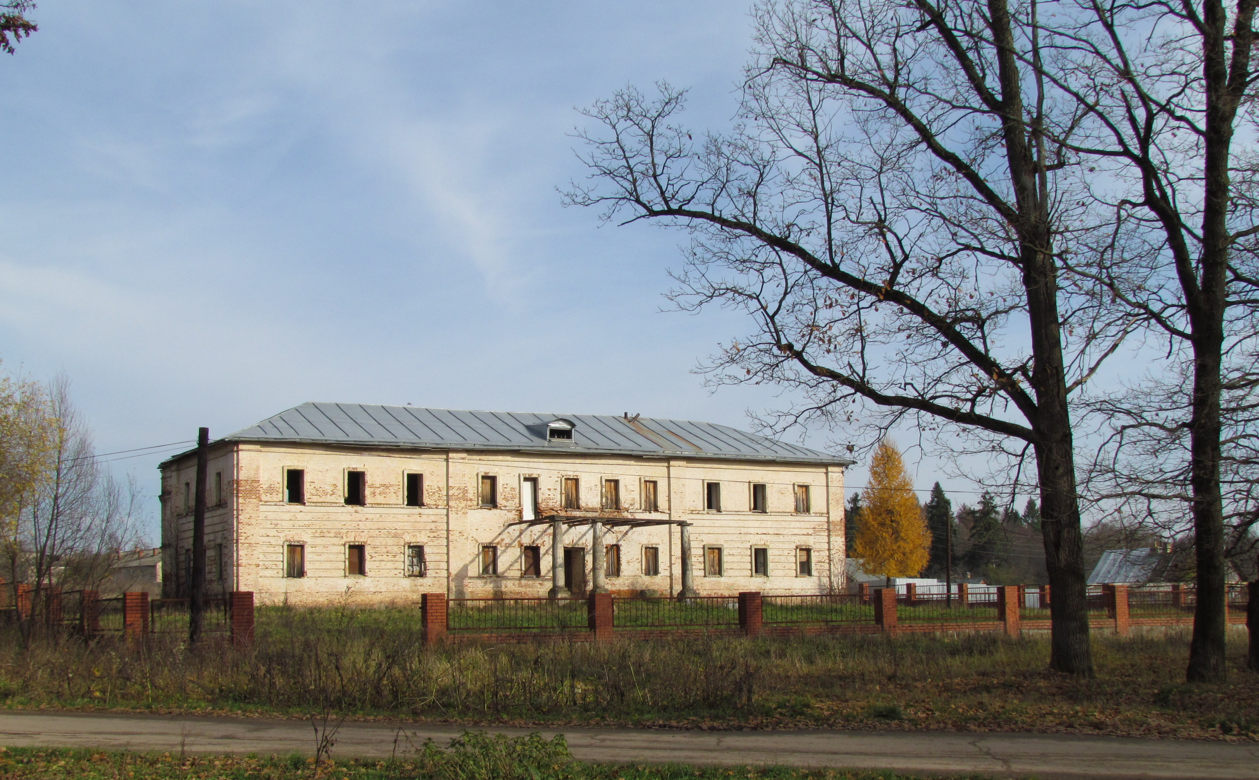 Усадьба Борятино (Калужская область, Жуков, село Борятино)